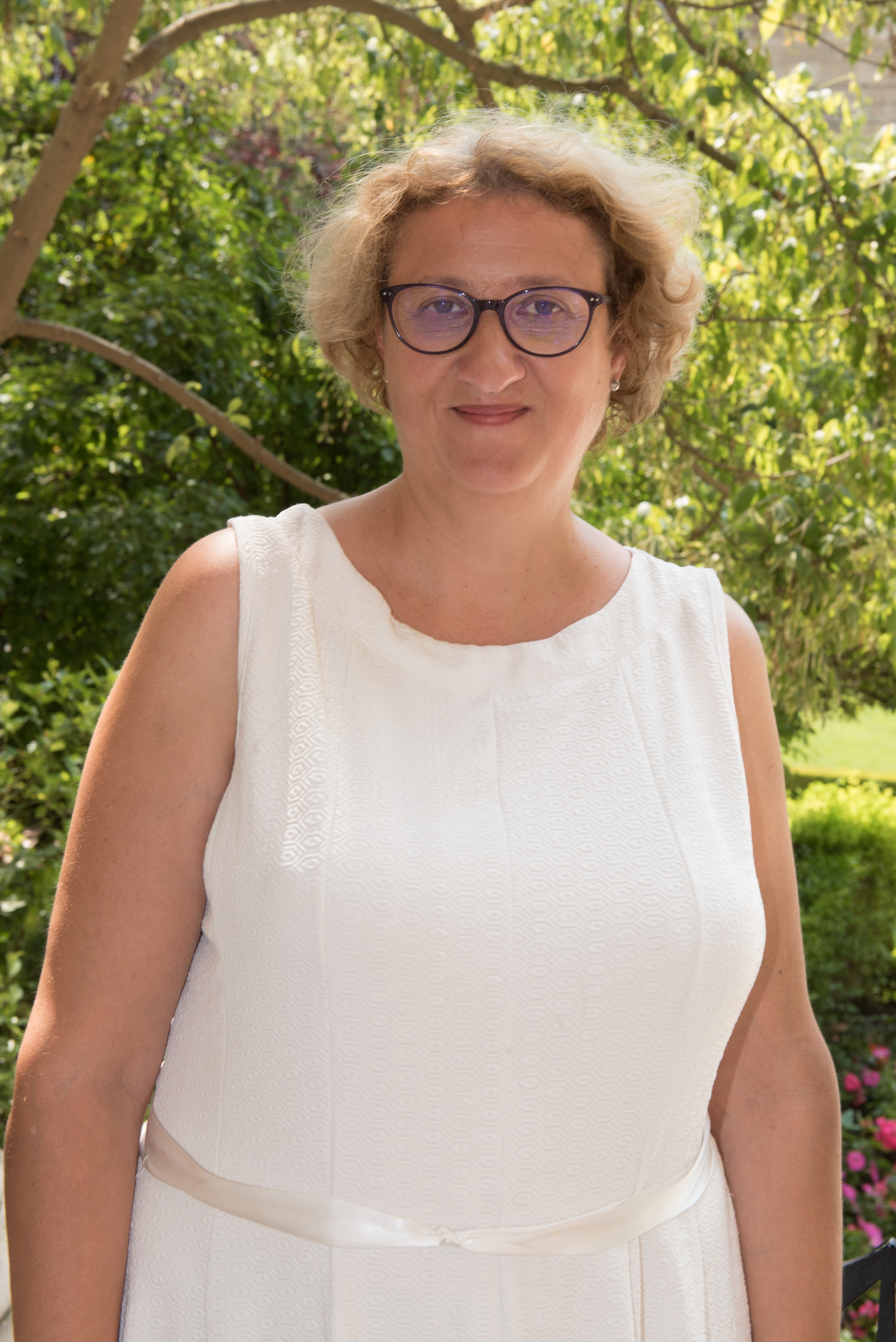 Isabelle Muller-Quoy dans le jardin des Quatre colonnes du palais Bourbon.